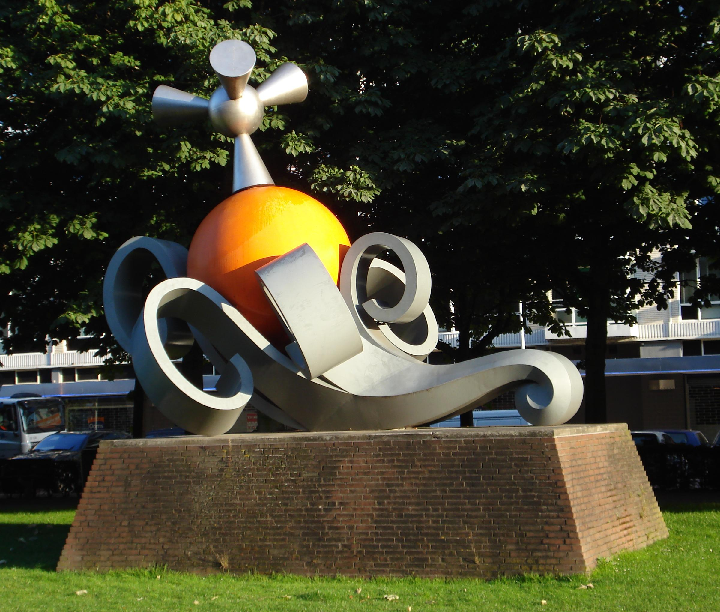 Rotterdam,Burgemeester van Walsumweg. Kunstwerk "Monument voor een ezel" van Geert van de Camp. Rotterdam/The Netherlands.